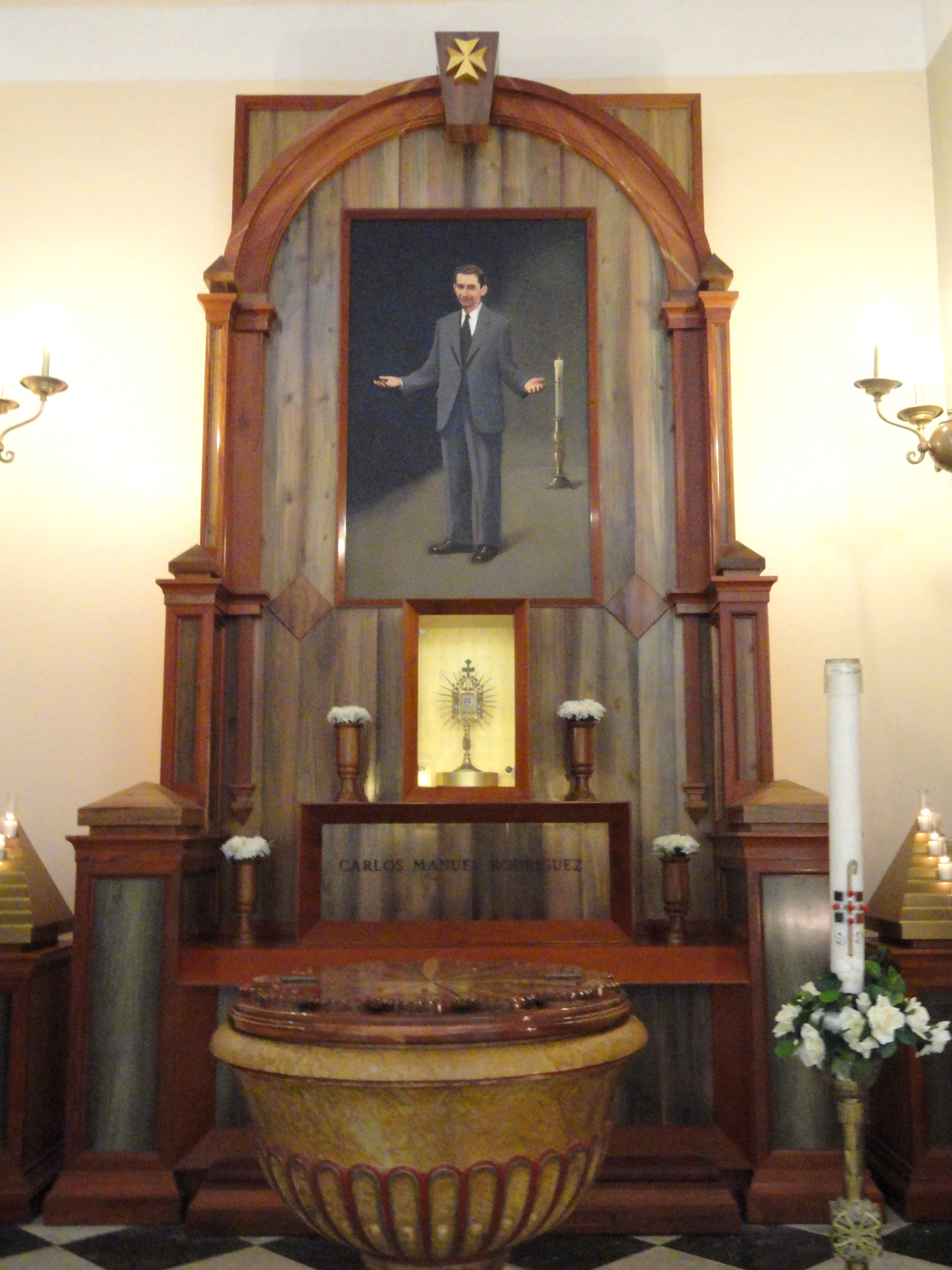 Catedral de San Juan Bautista de Puerto Rico, San Juan, Puerto Rico.